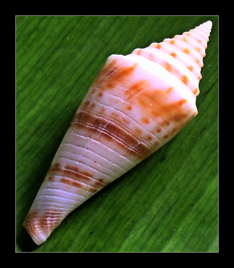 Ichinose Cone - Conasprella ichinoseana (Kuroda, 1956) (Kuroda, 1956); family Conidae